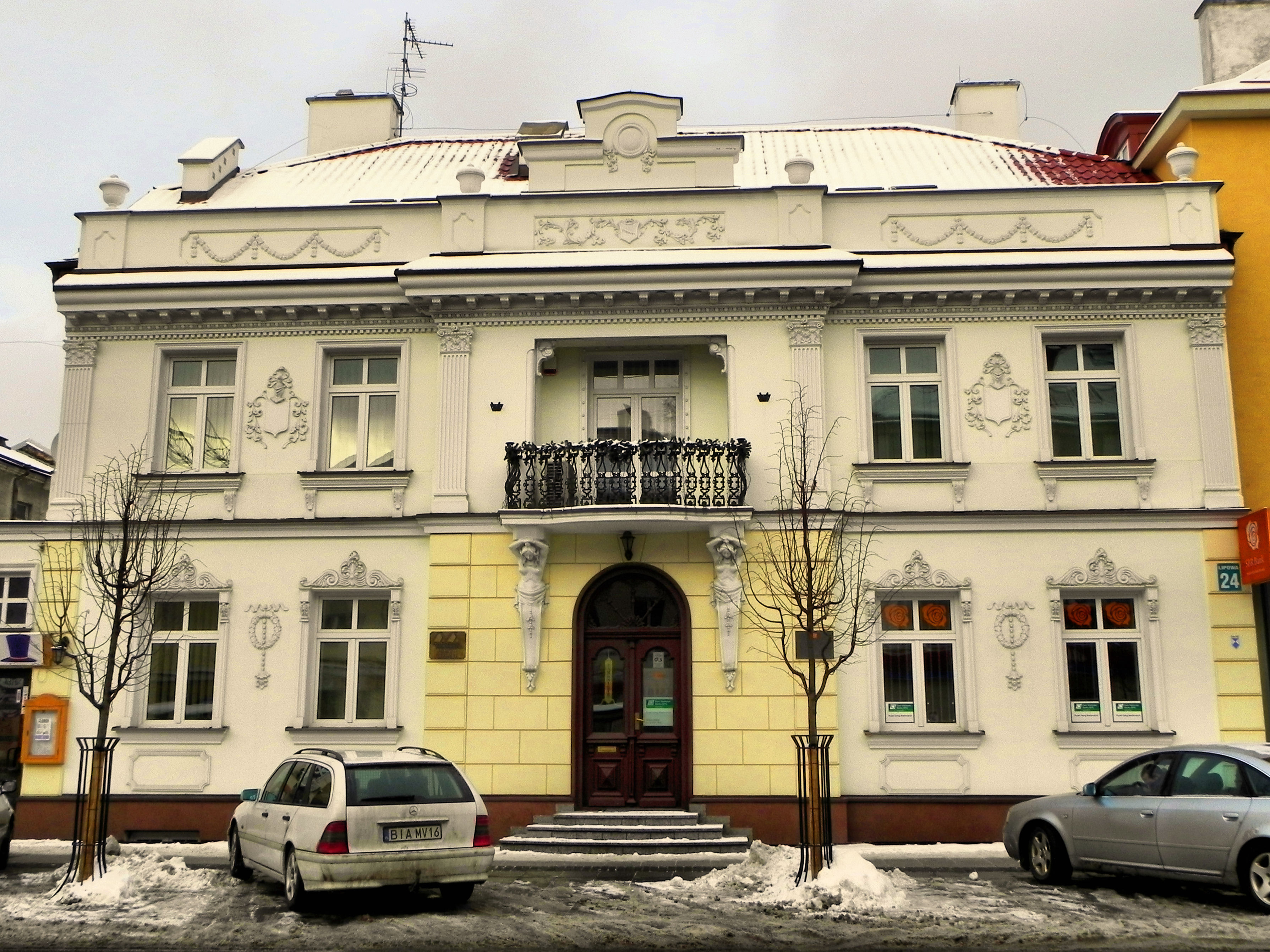 Białystok, ul. Lipowa 24 - kamienica, obecnie siedziba banku, przełom XIX i XX w. (zabytek nr A-244 z 22.12.1981)